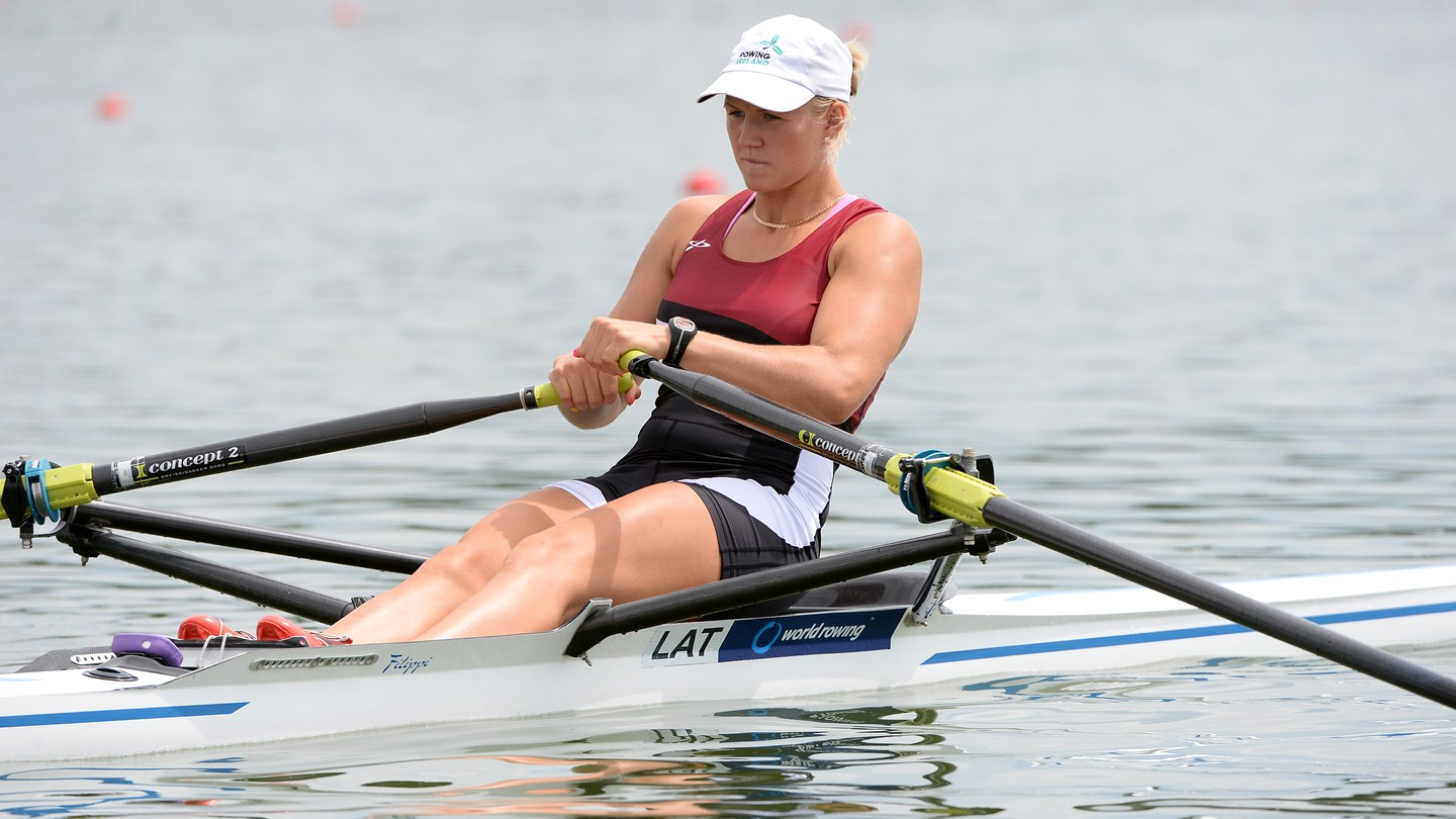 Elza Gulbe